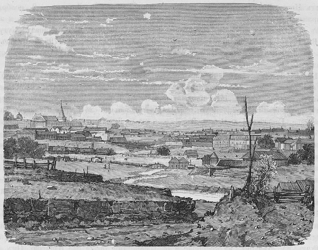 Беларуская (тарашкевіца): Горкі (Horki)